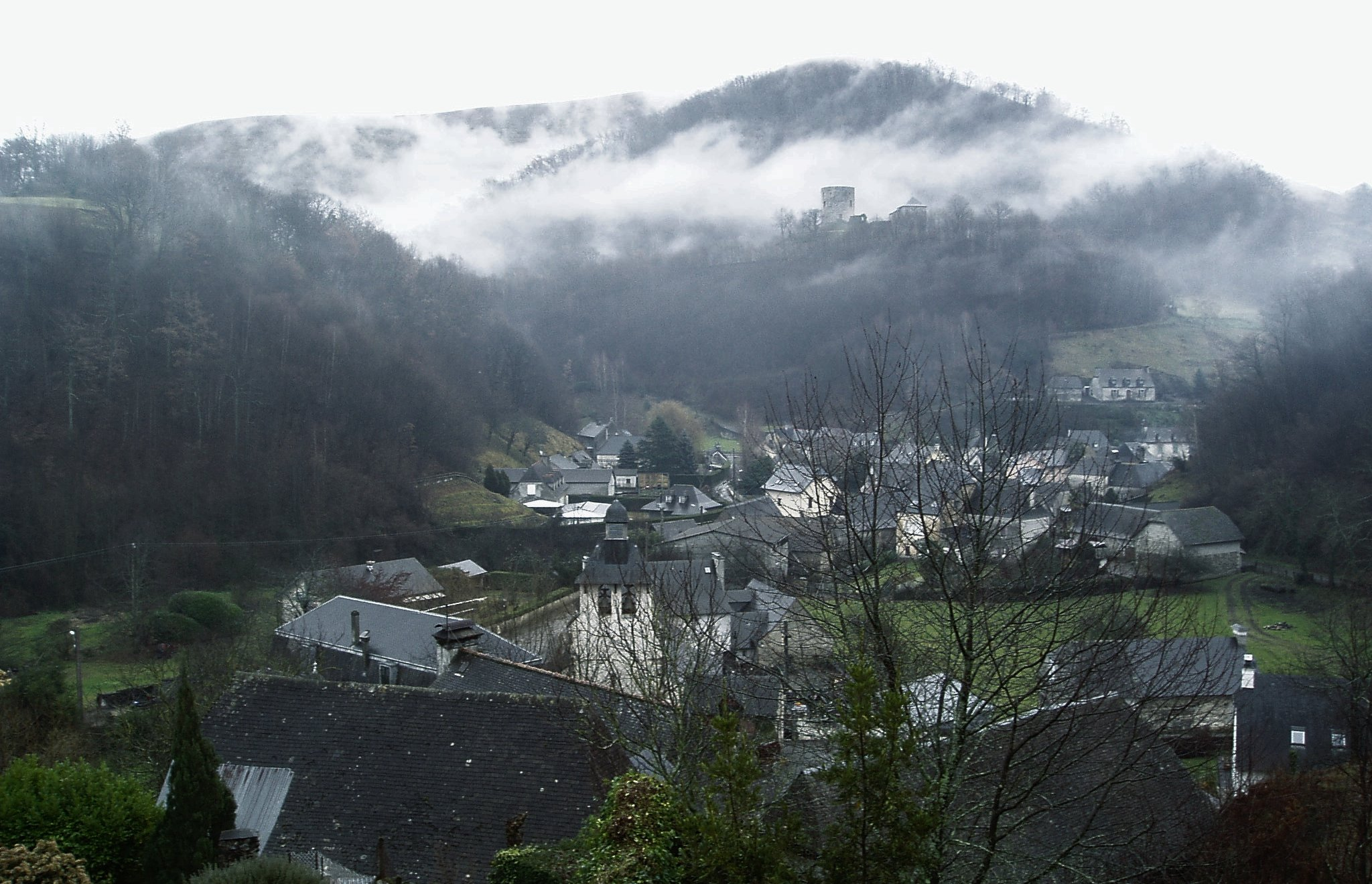 Photo du village des Angles (65 - hautes pyrénées) en Automne. Auteur de la photographie